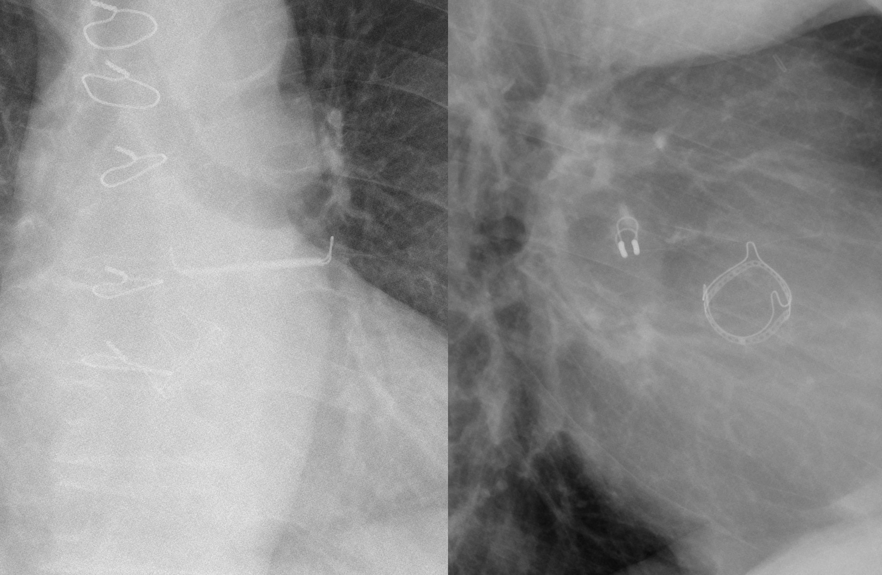 Operativ eingebrachter Spezialclip (AtriClip) auf dem linken Herzohr zur Vermeidung von Embolien aus diesem. Das Röntgenbild (Ausschnitte: links pa, rechts seitlich) zeigt zusätzlich noch eine künstliche Aortenklappe.